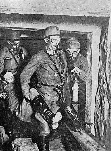 Avstro-ogrski vojak na tirolski frontii odnašajo iz rova na zrak tovariša, ki so ga omamili jamski plini